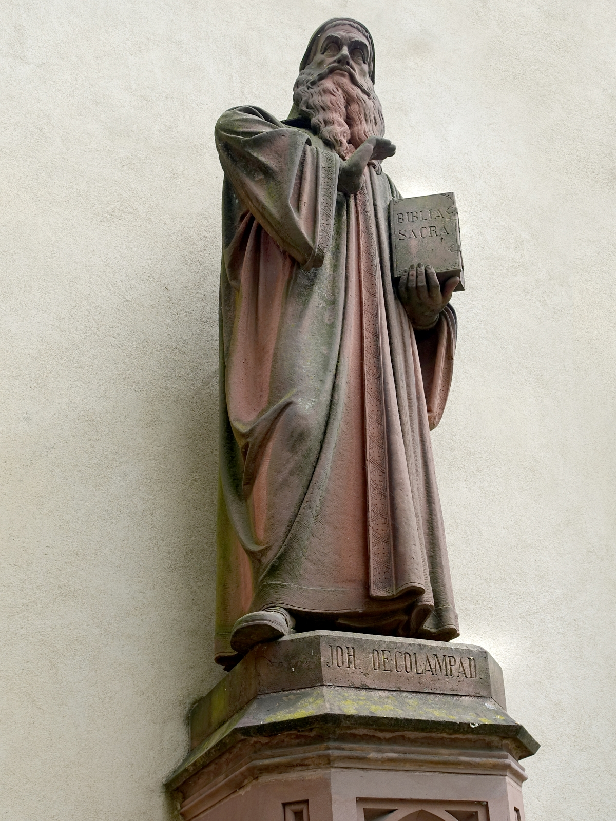 Johannes Oekolampad (1482-1531) Theologe Humanist, Reformer von Basel, Basler Münster